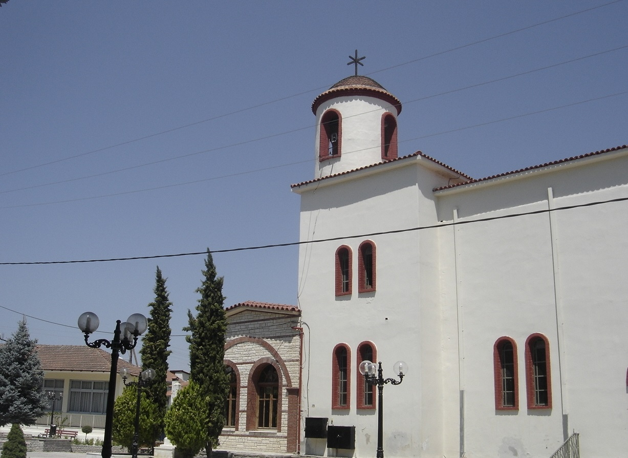 Church of St. Demetrius, in Karitsa, Pieria.